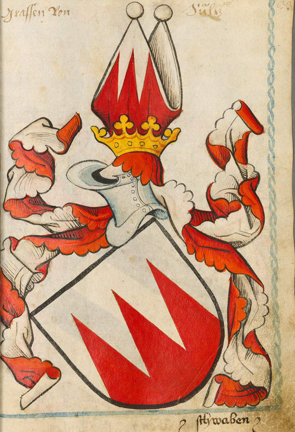 Scheibler'sches Wappenbuch, älterer Teil Sulz